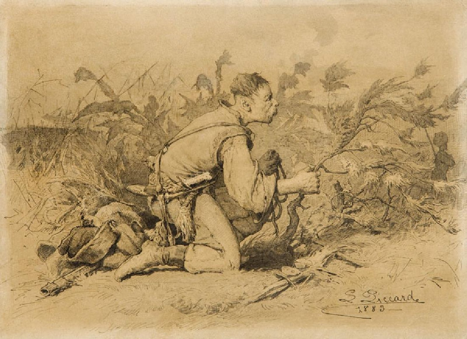 Kozak